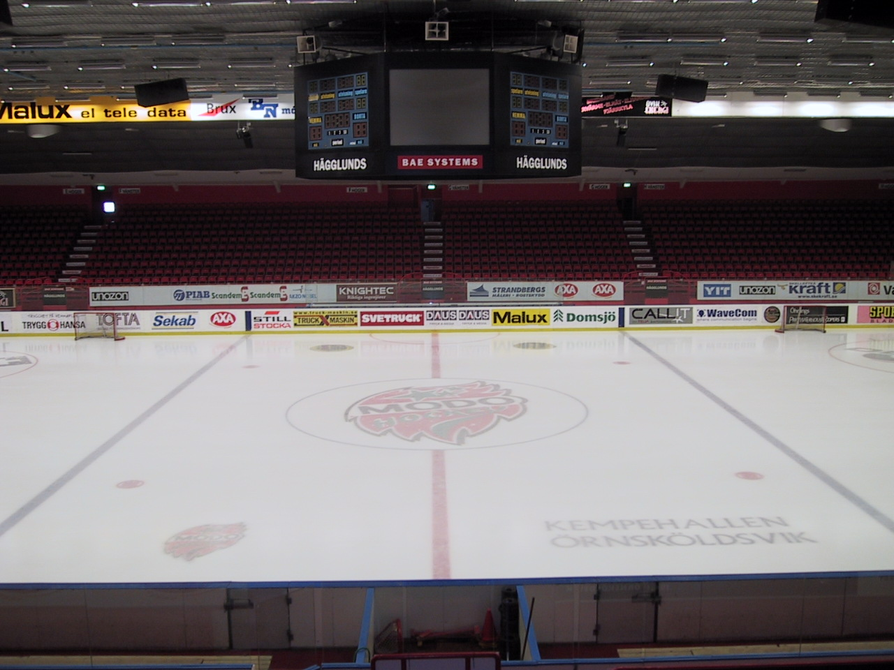 Kempehallen in Örnsköldsvik, Sweden